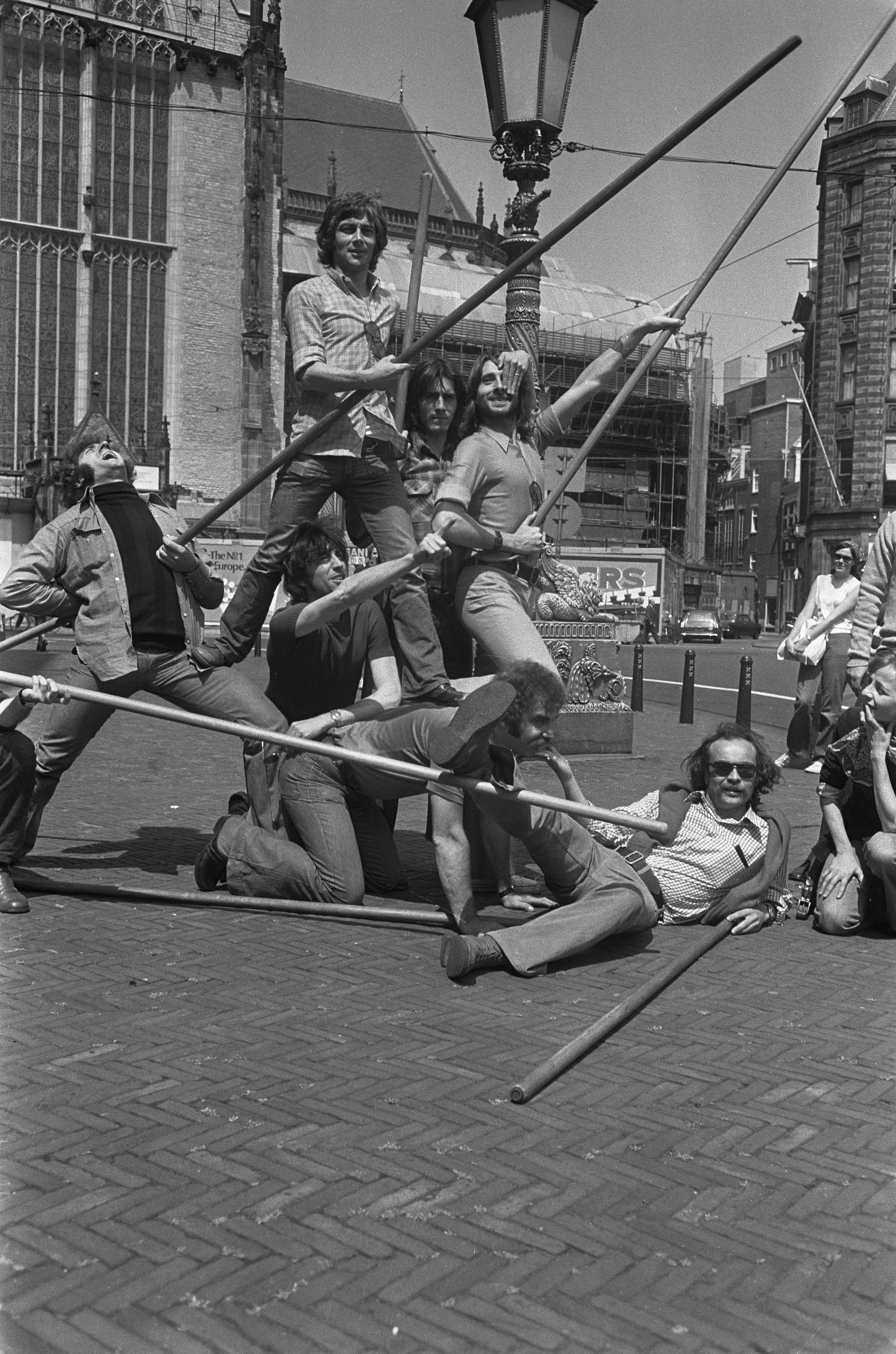 Collectie / Archief : Fotocollectie Anefo Reportage / Serie : [ onbekend ] Beschrijving : Antwerpse toneelgezelschap De Nieuwe Scene op de Dam in het kader van Holland Festival Datum : 21 juni 1973 Locatie : Antwerpen Trefwoorden : TONEELGEZELSCHAPPEN Instellingsnaam : Holland Festival Fotograaf : Croes, Rob C. / Anefo Auteursrechthebbende : Nationaal Archief Materiaalsoort : Negatief (zwart/wit) Nummer archiefinventaris : bekijk toegang 2.24.01.05 Bestanddeelnummer : 926-4979